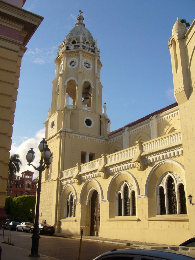 Casco Antiguo de Panama